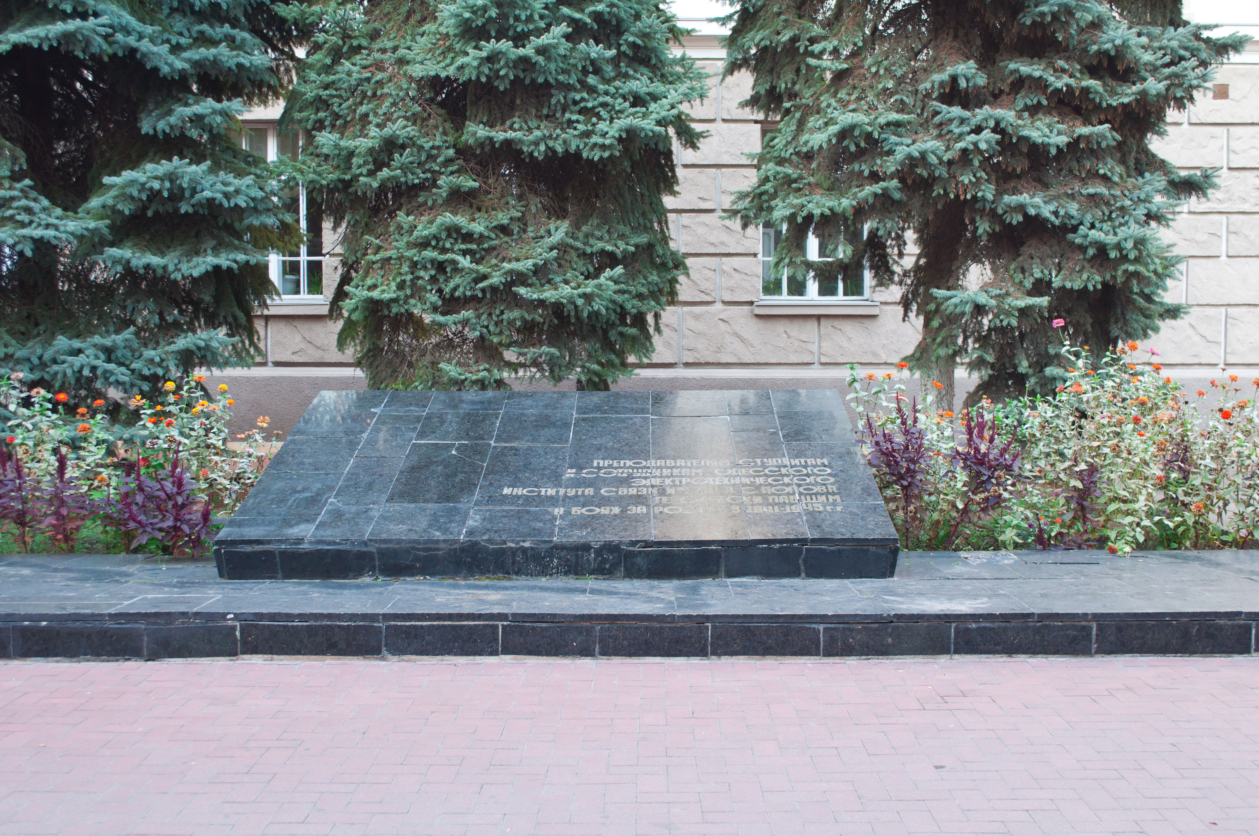 Пам’ятник студентам, викладачам та співробітникам Одеського електротехнічного інституту зв’язку, загиблим у роки Великої Вітчизняноїї війни